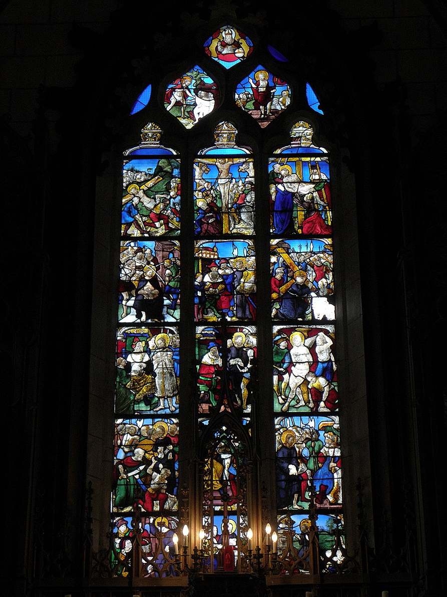 Maîtresse-vitre de l'église Saint-Léon de La Baussaine (35).